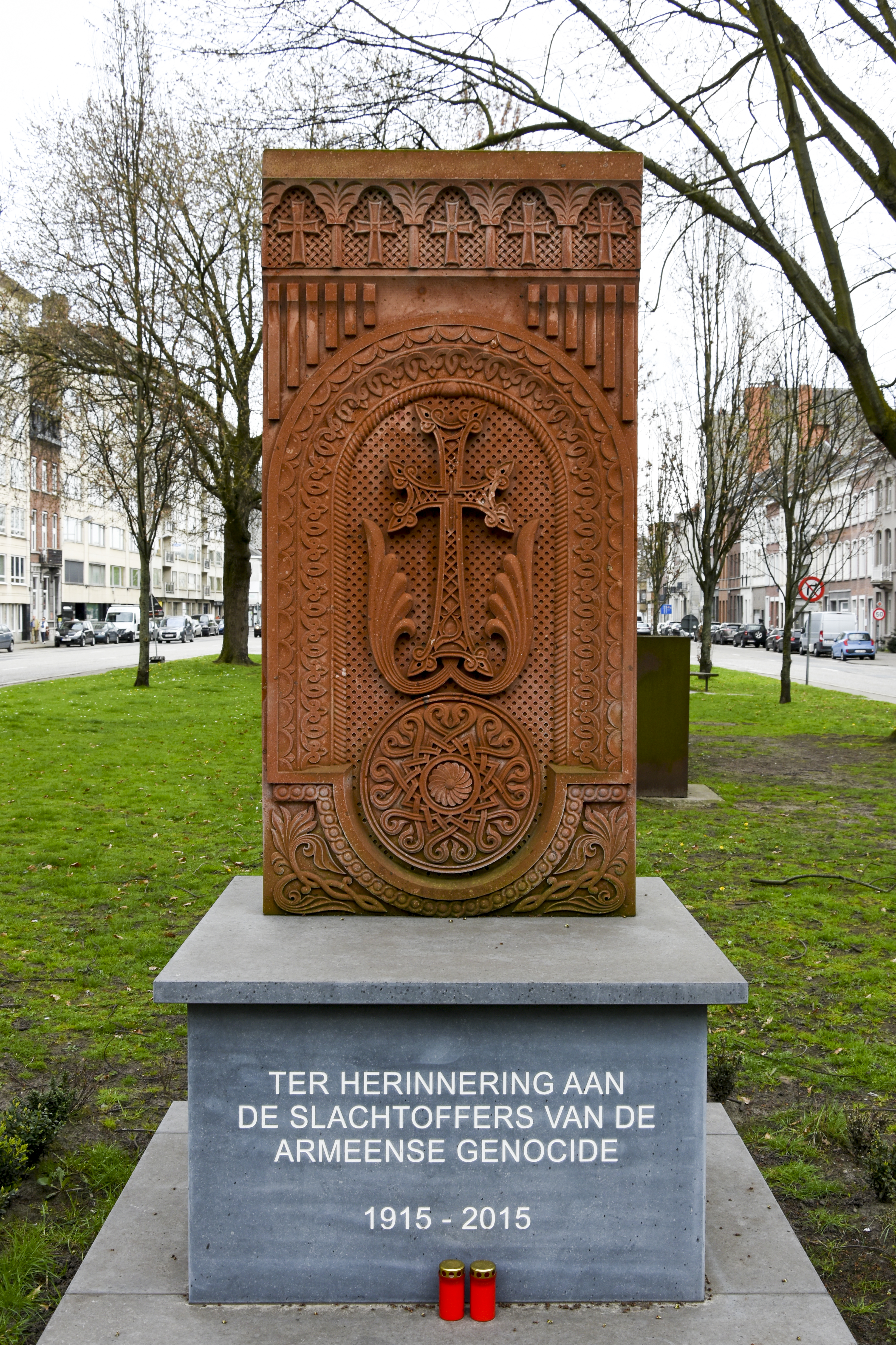 Armeense kruissteen - ter herinnering aan de slachtoffers van de Armeense genocide - Schuttersvest Mechelen